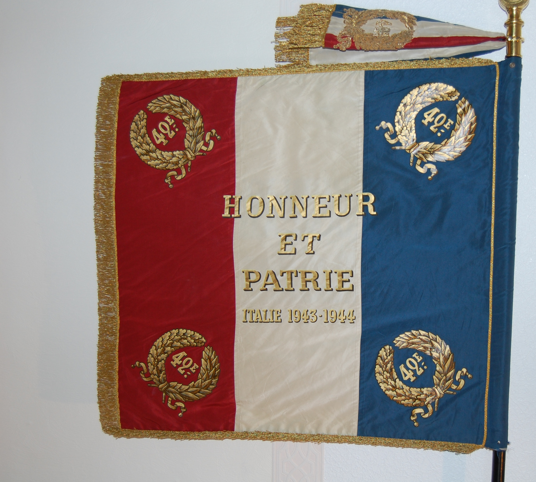 Le drapeau du 42e régiment de transmission (France).